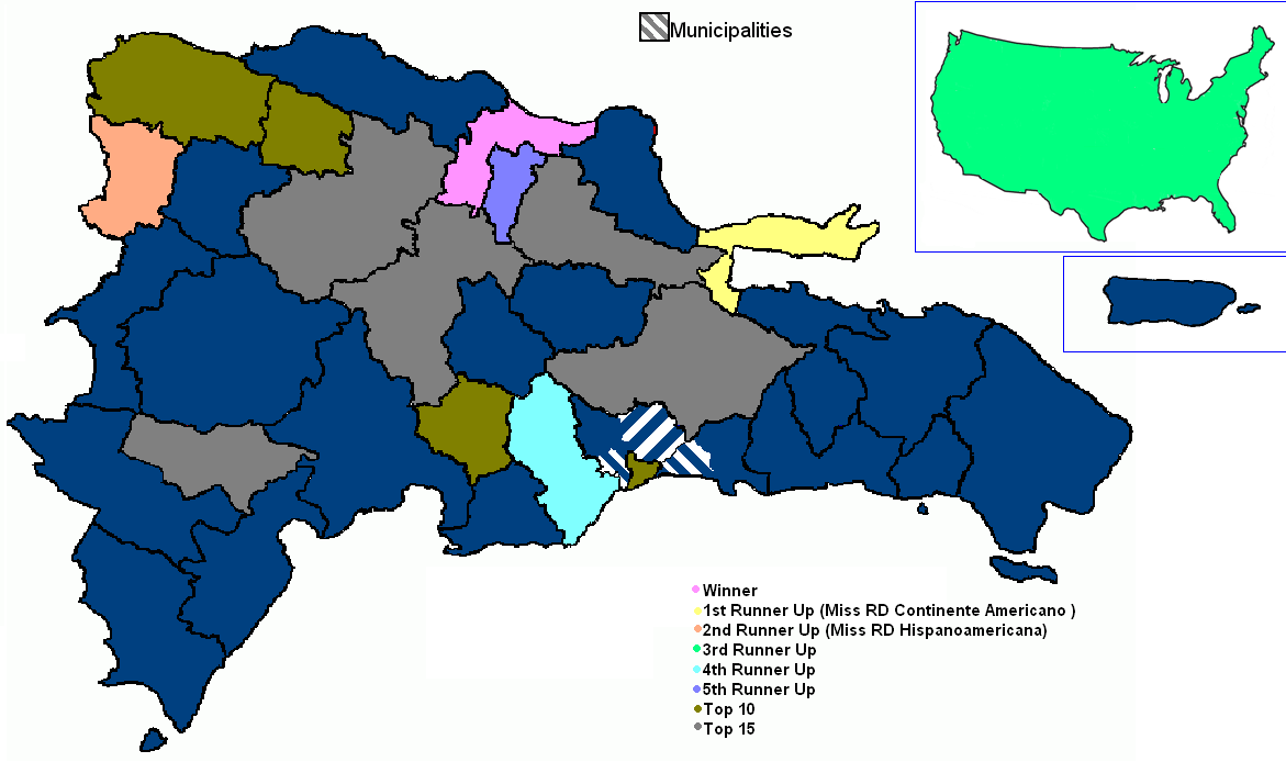 Mapa de las provincias y comunidades dominicanas en el concurso de Miss República Dominicana 2010.